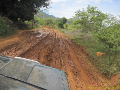 route nationale 5a entre Daraina et Vohémar